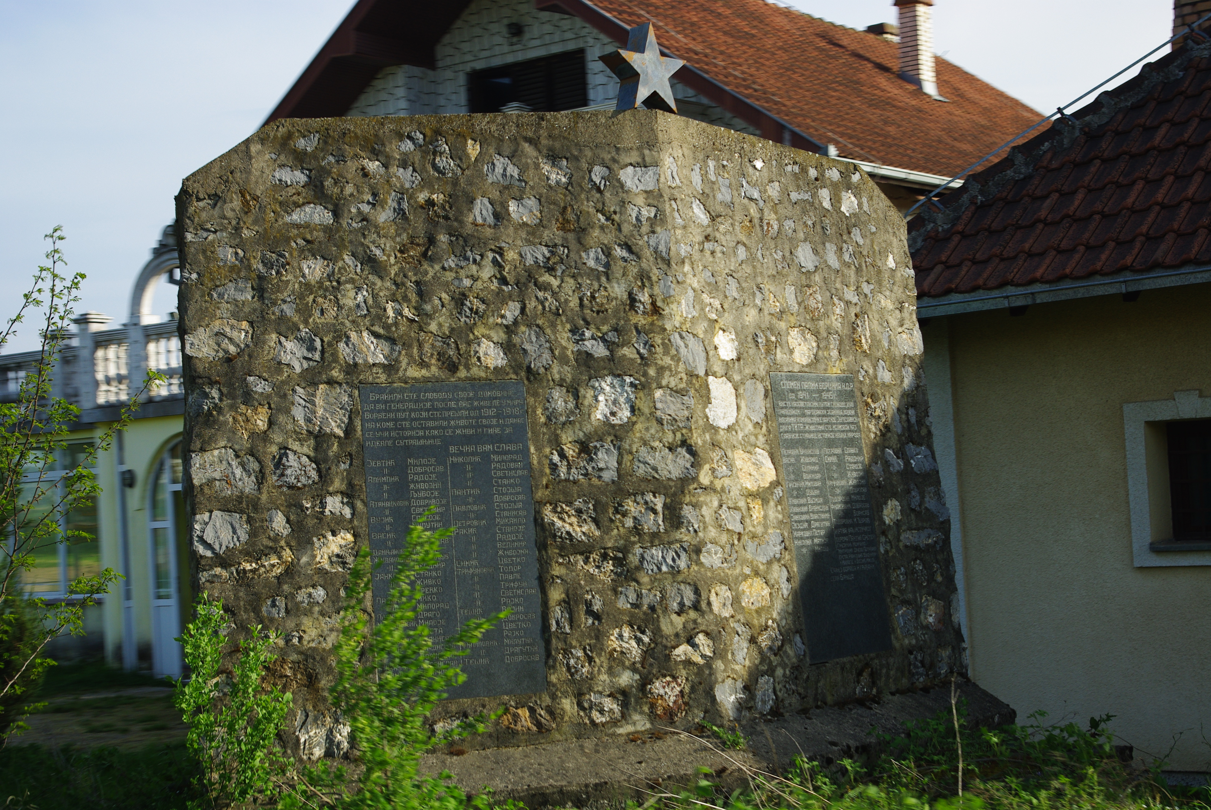 Spomenik palim borcima u selu Brnjac, Loznica, Srbija.